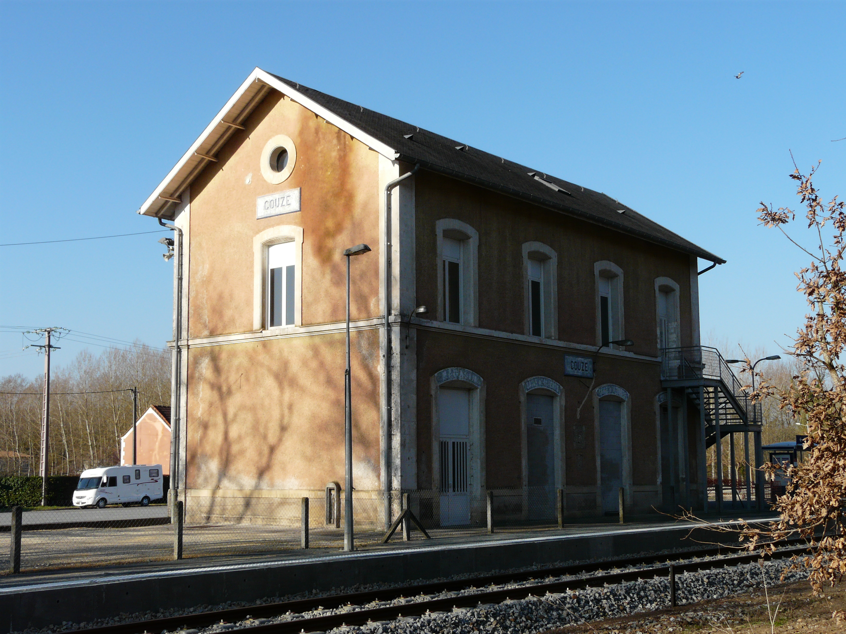 L'ancien bâtiment de la gare de Couze, Port-de-Couze, Lalinde, Dordogne, France.